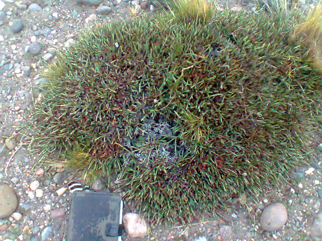 Cerca de Lago Buenos Aires, Provincia de santa Cruz, Argentina, sobre sustrato pedregoso de origen fluvio-glacial